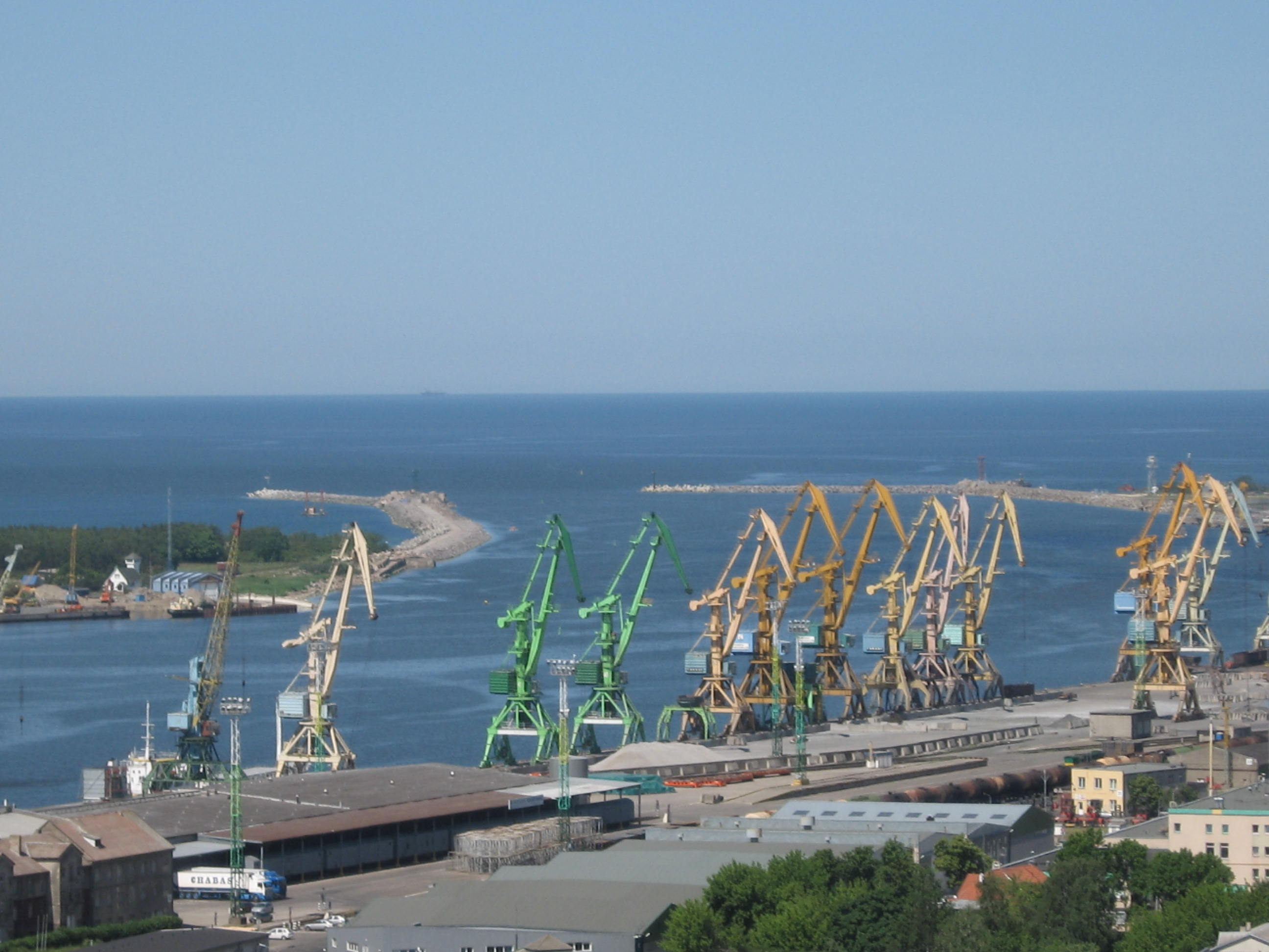 Klaipėdos jūros vartai